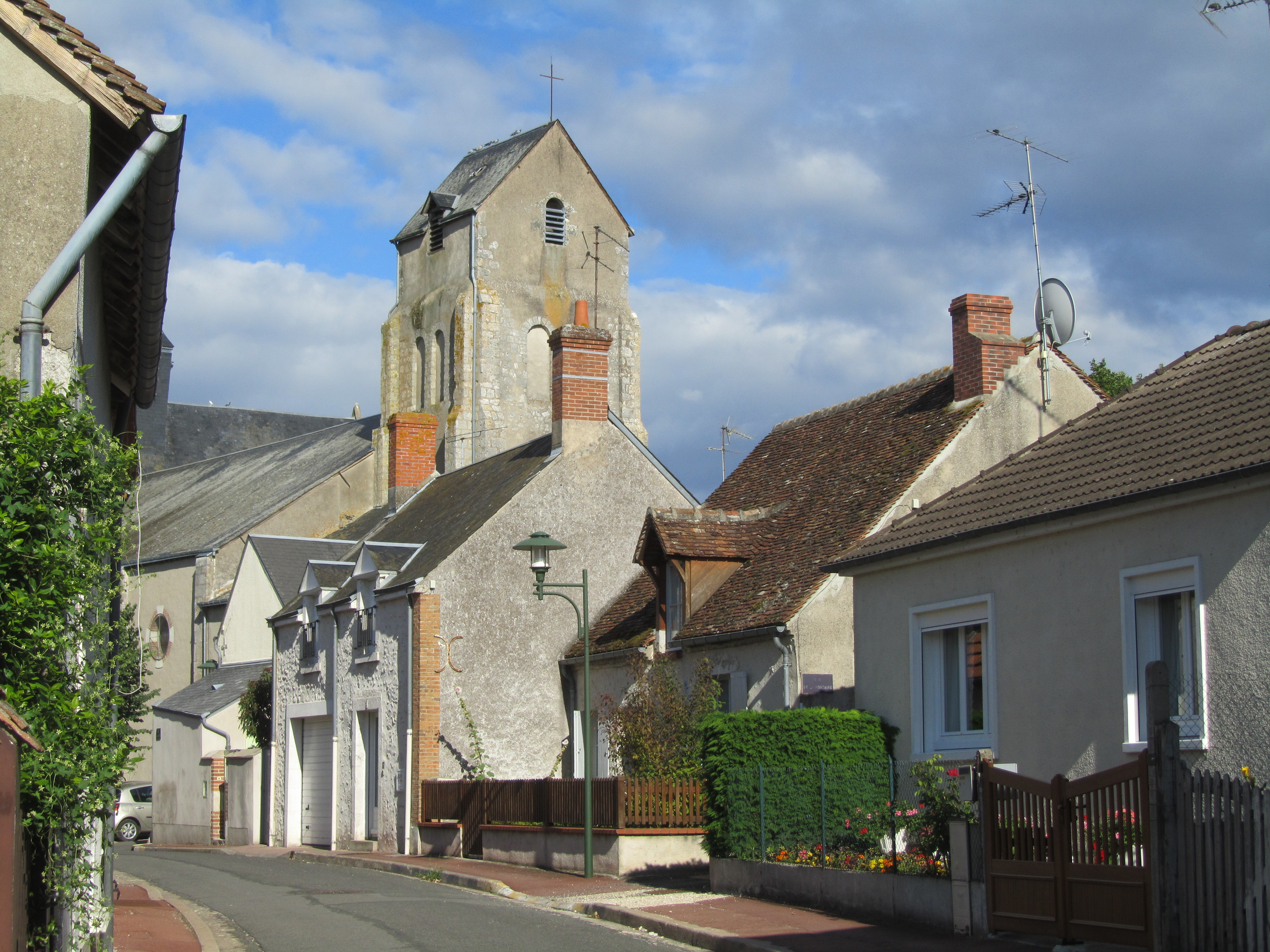 La rue au lait, avec vue sur l'église de Saint-Laurent-Nouan.